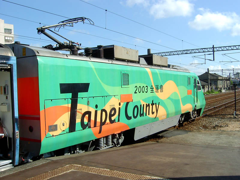 臺灣鐵路管理局推拉式自強號2003年中華民國全國運動會彩繪列車。